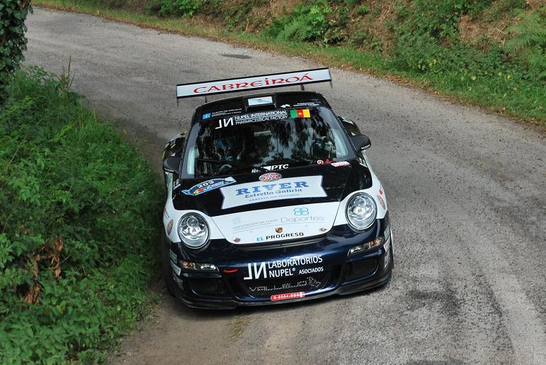 Sergio Vallejo en el Rallye Príncipe de Asturias 2009 (IRC - Campeonato de España de rallyes sobre asfalto). Tramo de Morcín